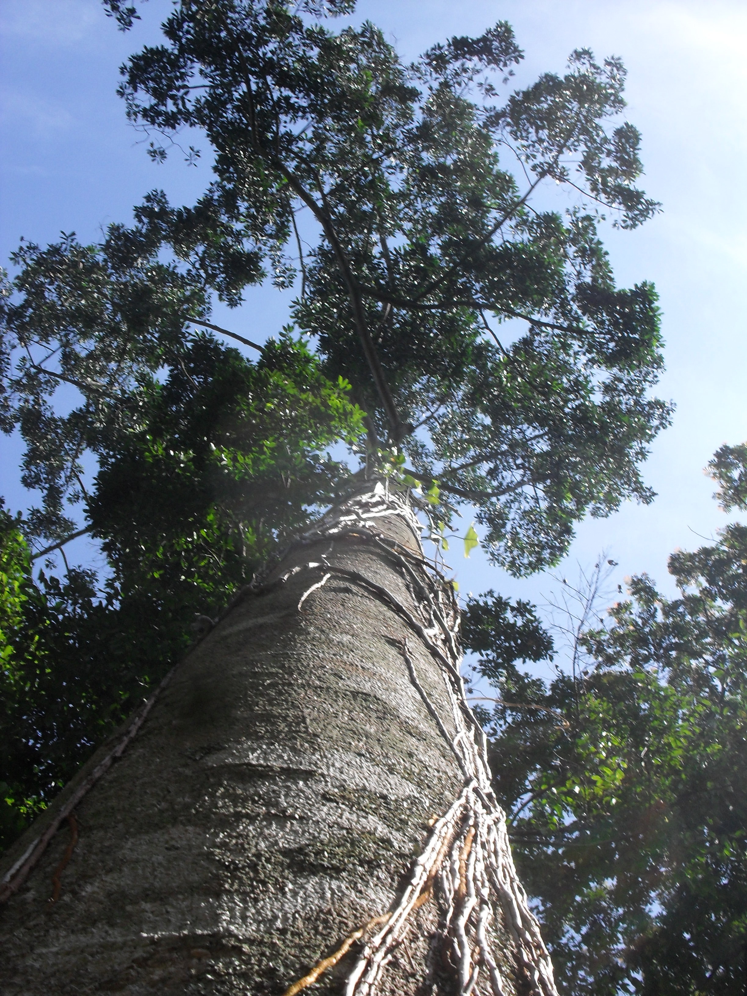 Figura tomada del el Municipio de Huehhuetán, Chiapas, México.